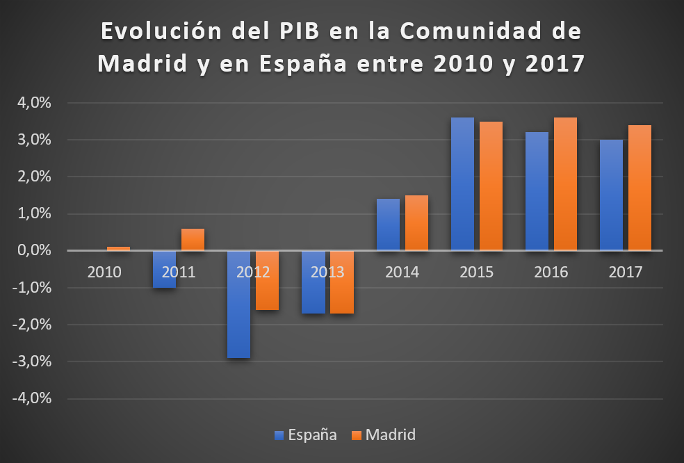 Evolución del PIB en la Comunidad de Madrid y en España entre 2010 y 2017